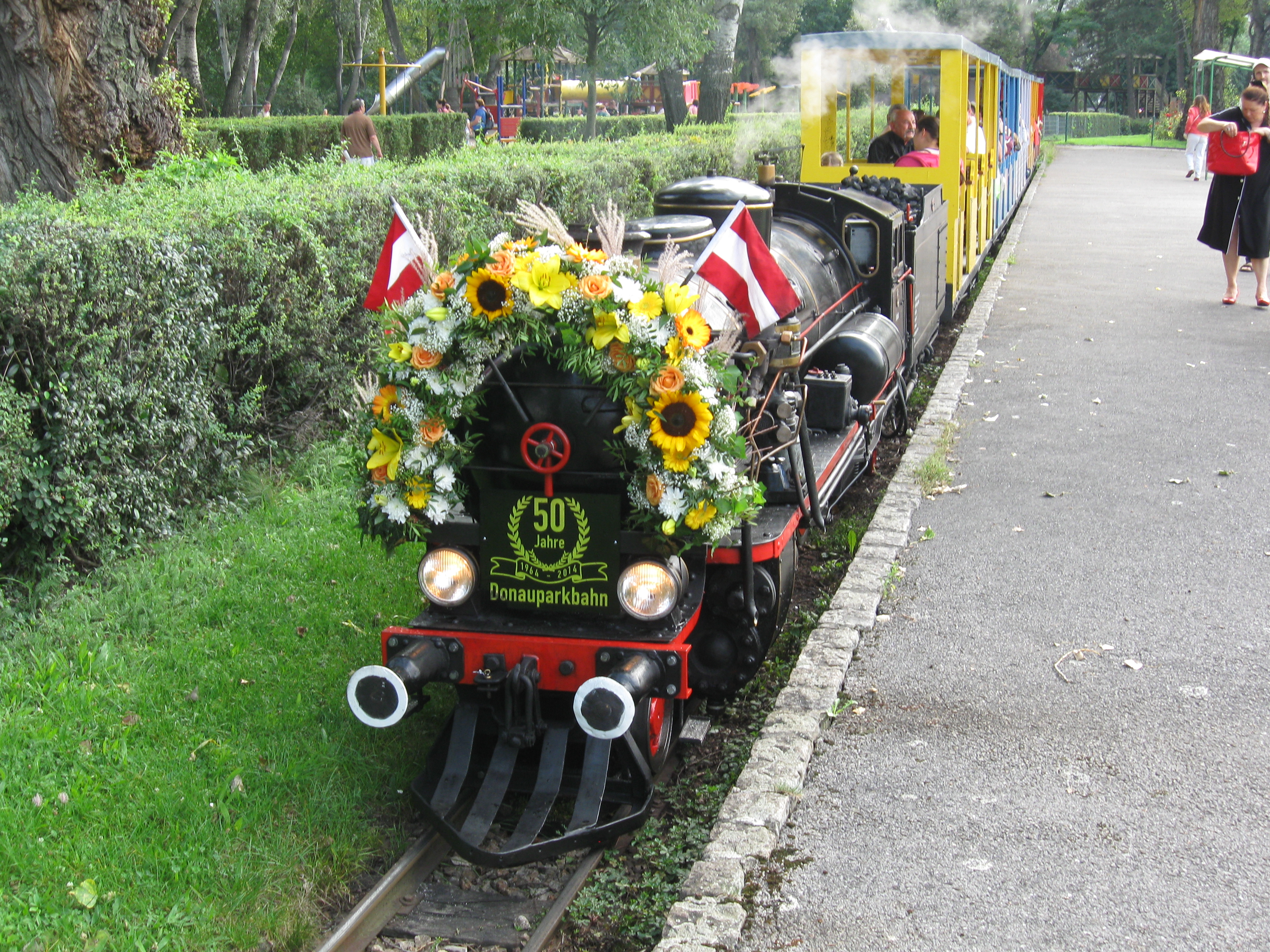 geschmückte Dampflok zur 50 Jahr Feier der Donauparkbahn in Wien